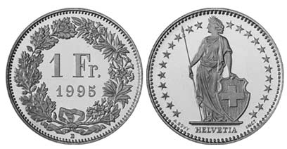 1 CHF / Fünffranken